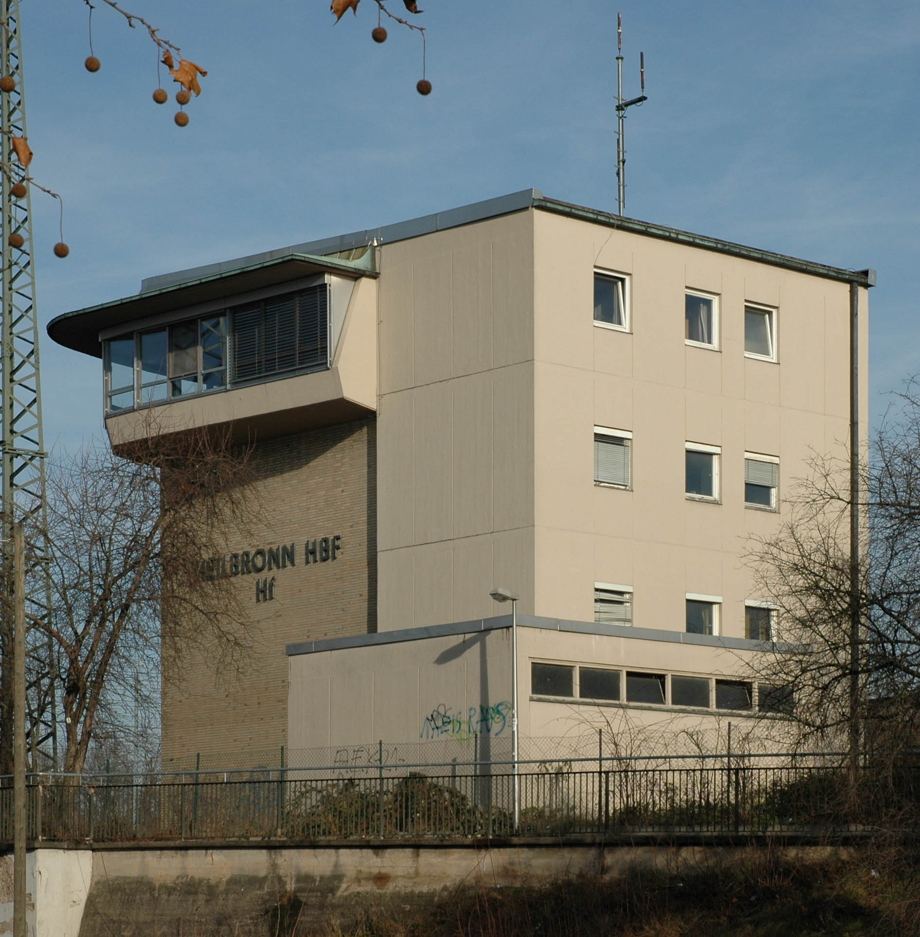 Stellwerk "Hf" des Heilbronner Hauptbahnhofs.